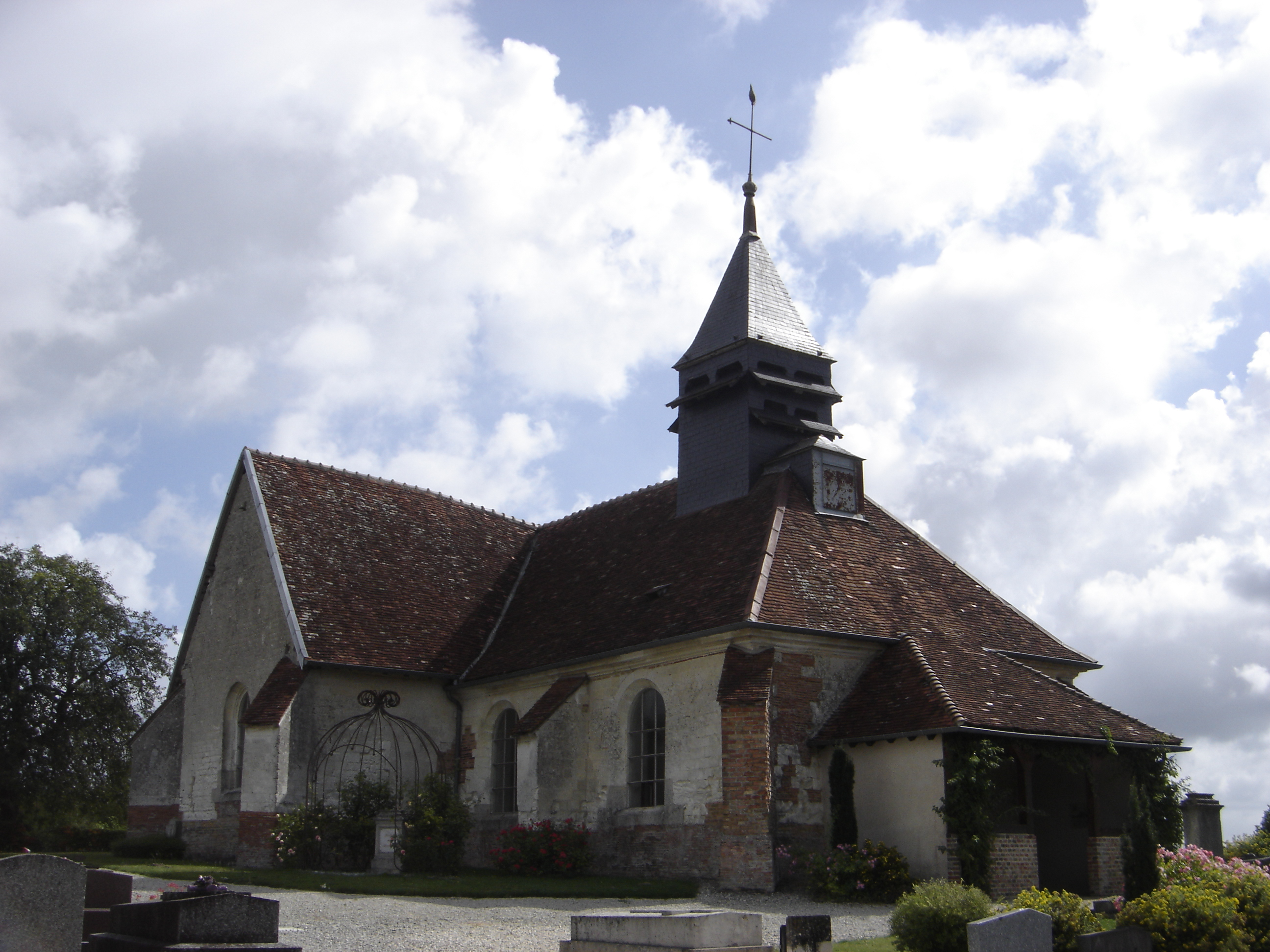 église Saint-Jean-Baptiste de Dosches - Aube - France